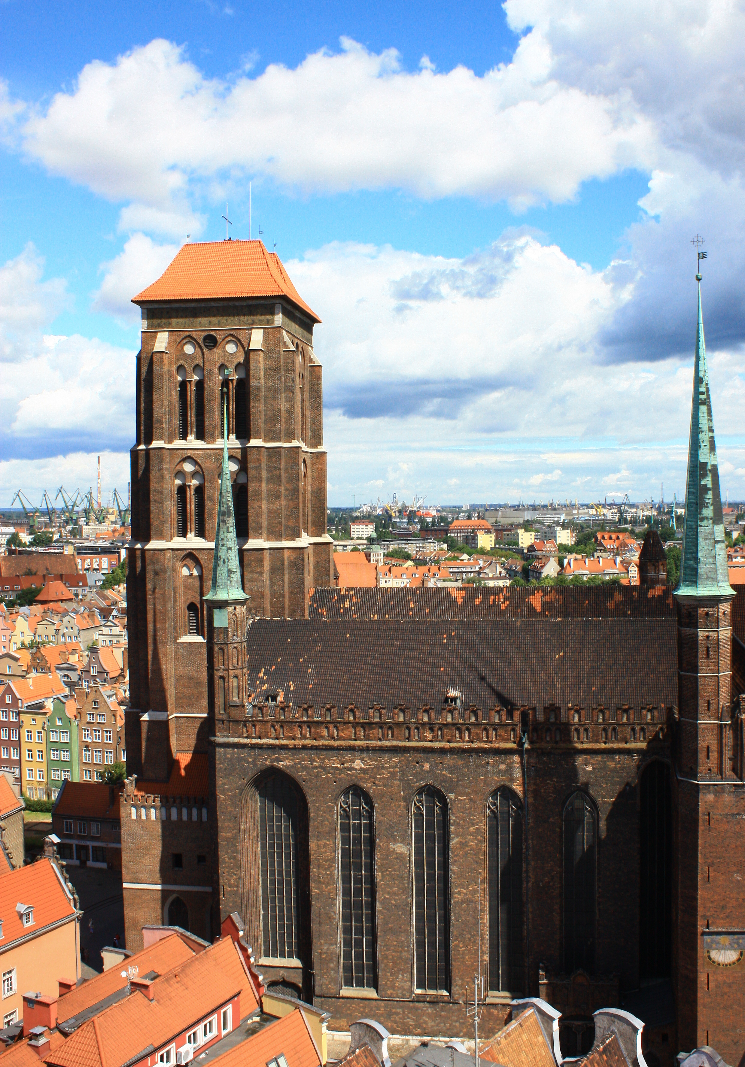 Gdańsk, kościół par. p.w. Wniebowzięcia NMP, tzw. Mariacki, 1343, 1502, po 1945